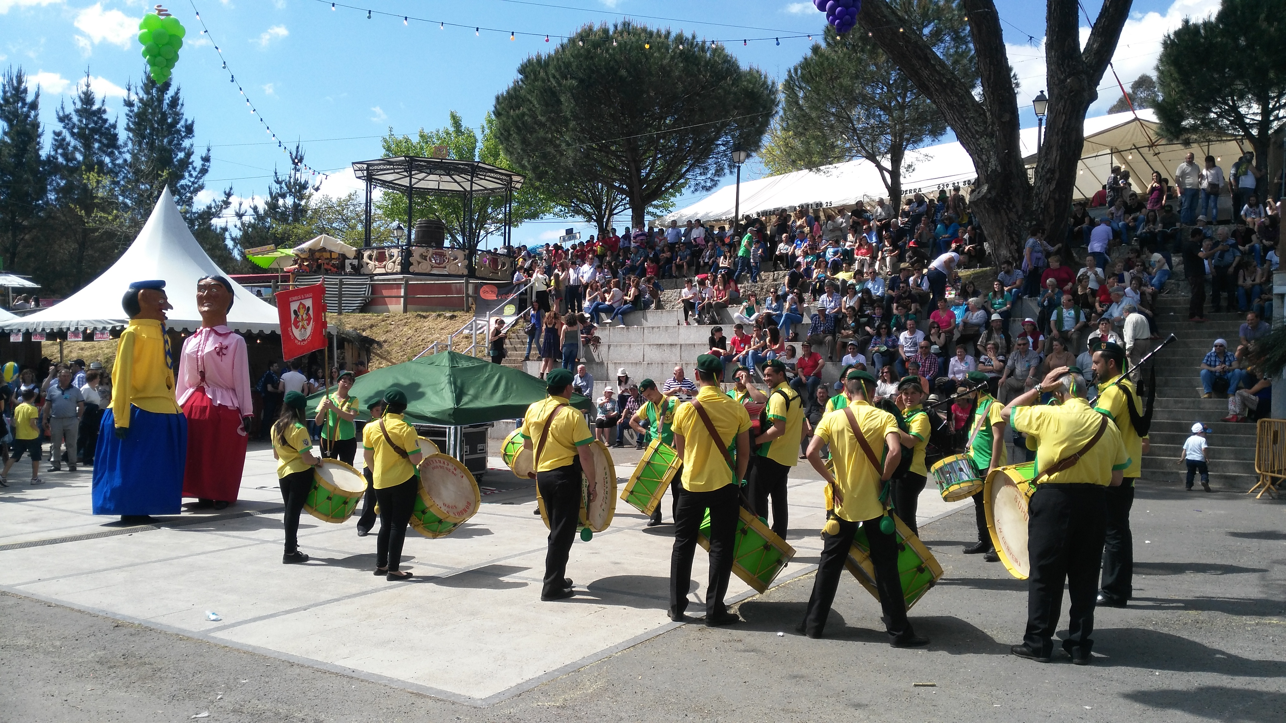 Festa do viño da Ulla 2015